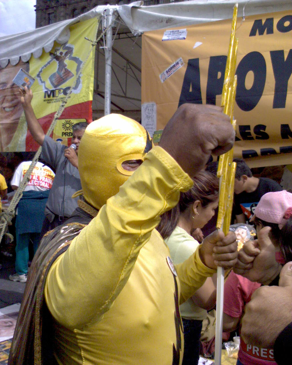 Un personaje de la lucha libre, en la asamblea. Disclaimer: No pertenezco al PRD, ni soy seguidor de ellos (ni de ningún otro partido político), sirvan estas fotos para dar a conocer algunas escenas del evento.